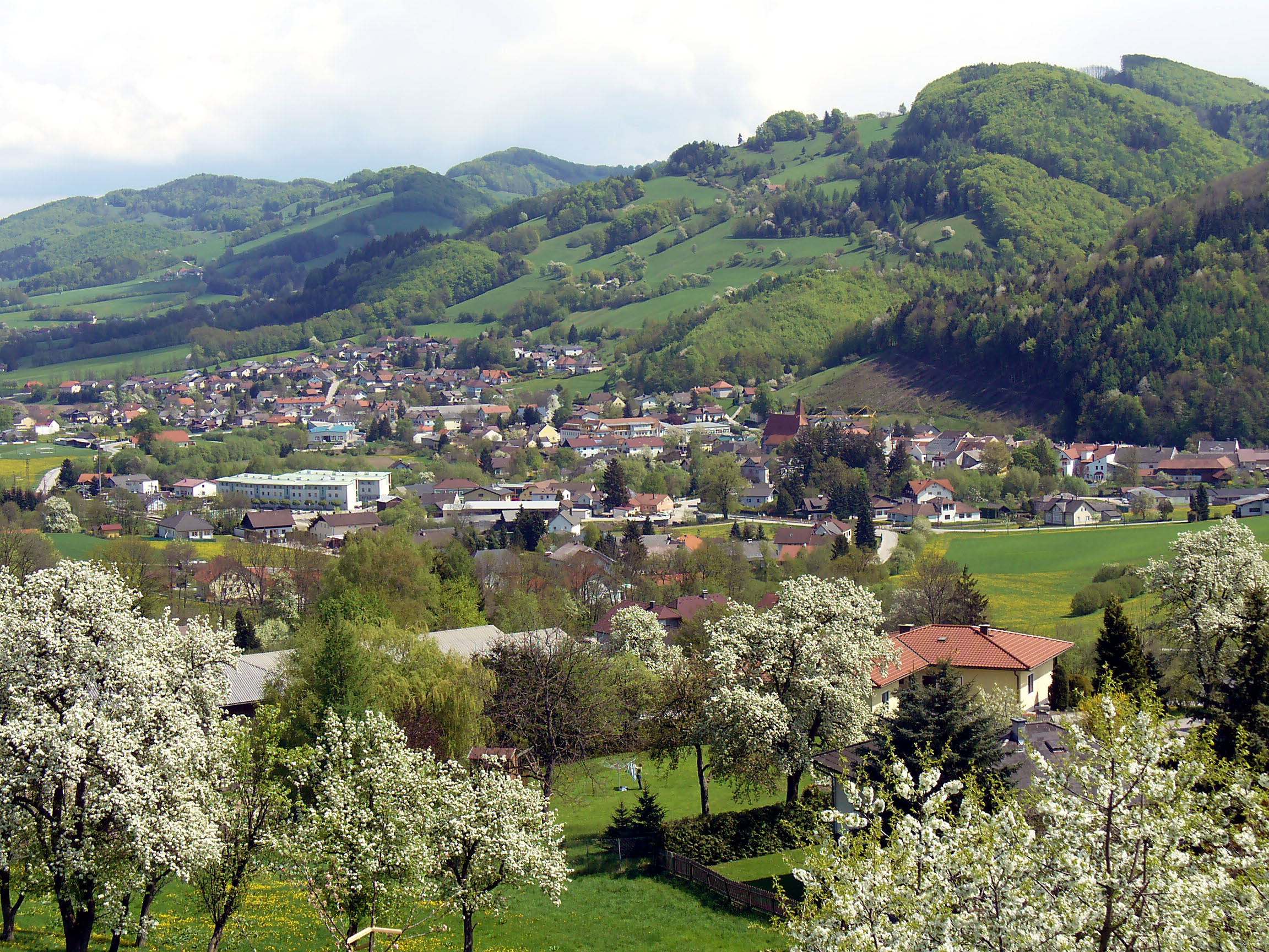 Frühlingsbild von Rabenstein an der Pielach, Niederösterreich.